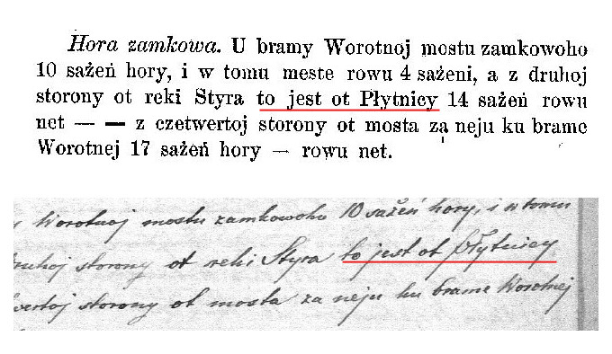 Скани з друкованої і рукописної версій книги Тадеуша Стецького «Łuck starożytny i dziesiejszy». Червоним підкреслено, як він передавав випис із люстрації, що нас цікавить